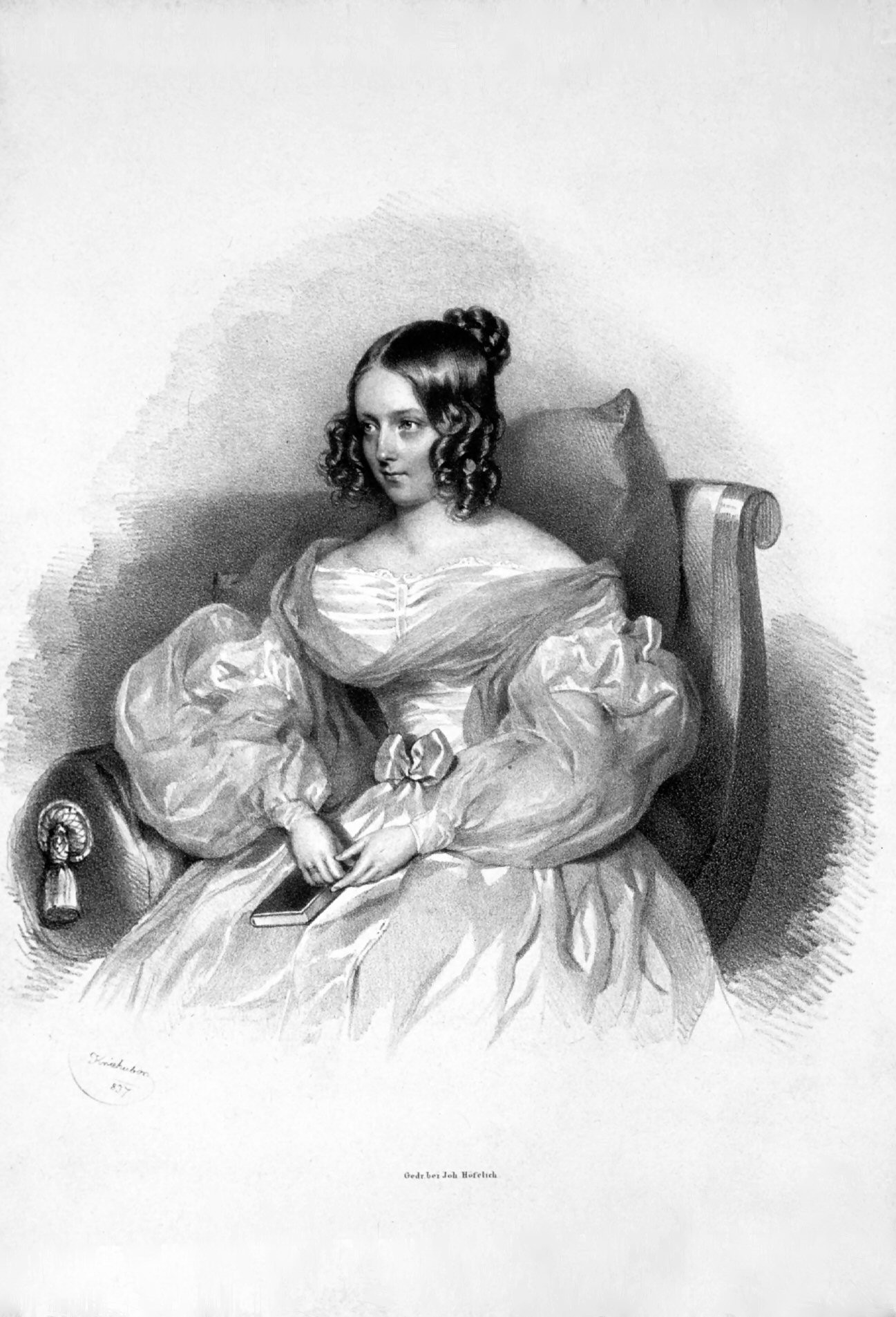 Luise von Baden (1811–1854), 1830 mit Gustav von Holstein-Gottorp-Wasa verheiratet. Lithographie von Josef Kriehuber, 1837